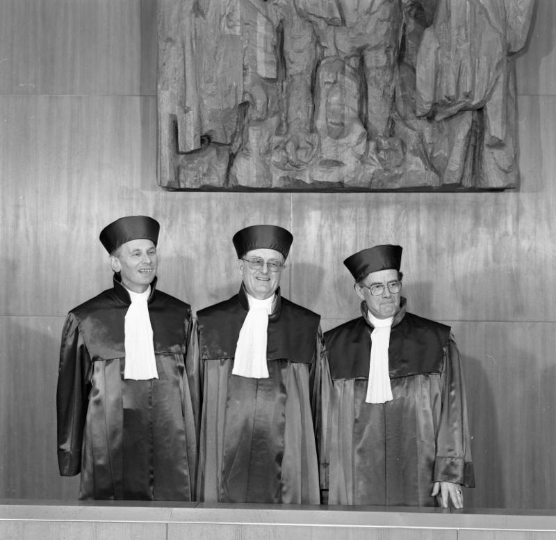 18.12.1989 Bundesverfassungsgericht Karlsruhe v.l.: Prof. Dr. Dieter Grimm (I. Senat), Prof. Dr. Hermann Heußner (I. Senat), Prof. Dr. Dr. Ernst-Wolfgang Böckenförde (II. Senat)